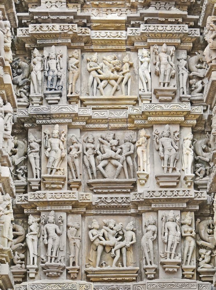 Sculptures murales d'inspiration tantrique sur les murs du temple Kandarîya Mahadeveda à Khajuraho. Face Nord. Pour le Tantrisme, il ne s'agit pas de représentations de poses sexuelles mais de celles de couples yogi unis dans l'extase et servant de symbole universel à l'accomplissement spirituel (Genetical craftmanship of the word of God). Le Tantrisme tente de saisir la nature du temps et de remonter l'échelle de la Genèse en réveillant toutes les énergies et les émotions disponibles, pour les rassembler et en faire le véhicule vers l'Illumination. Ce temple est dédié à Shiva, il a été construit entre 1025 et 1050 Le Temple de Kandariya Mahadeva est le plus grand et le plus décoré de l'ensemble de temples hindouistes de Khajuraho dans l'état du Madhya Pradesh en Inde. Il est considéré comme l'un des meilleurs exemples des temples de l'époque médiévale en Inde. Extrait de l'article de Wikipedia sur le temple (voir le plan) ____________ Les temples de Khajuraho sont inscrits sur la liste du patrimoine mondial de l'UNESCO. A l'époque médiévale, le site appelé Jejakbhukti, était la capitale du royaume des rajas Chandelas qui ont pris le pouvoir au début du Xème siècle. Ils y ont fait construire 85 temples dont seulement 25 existent encore aujourd'hui dans différents états de conservation mais tous ont été restaurés. Le site de Khajuraho a perdu de son importance vers 1500. La plupart des temples sont construits en grès, certains sont en granite. Ils font partie des chefs-d’œuvre de l'art hindou. Article de Wikipedia sur Khajuraho Les temples sur Insecula Site indien